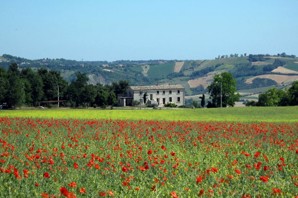 Caprafico piane - 2012